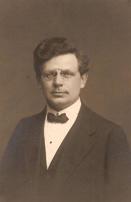 Иван Павлович Антонов (1887—1967) — архитектор-художник.